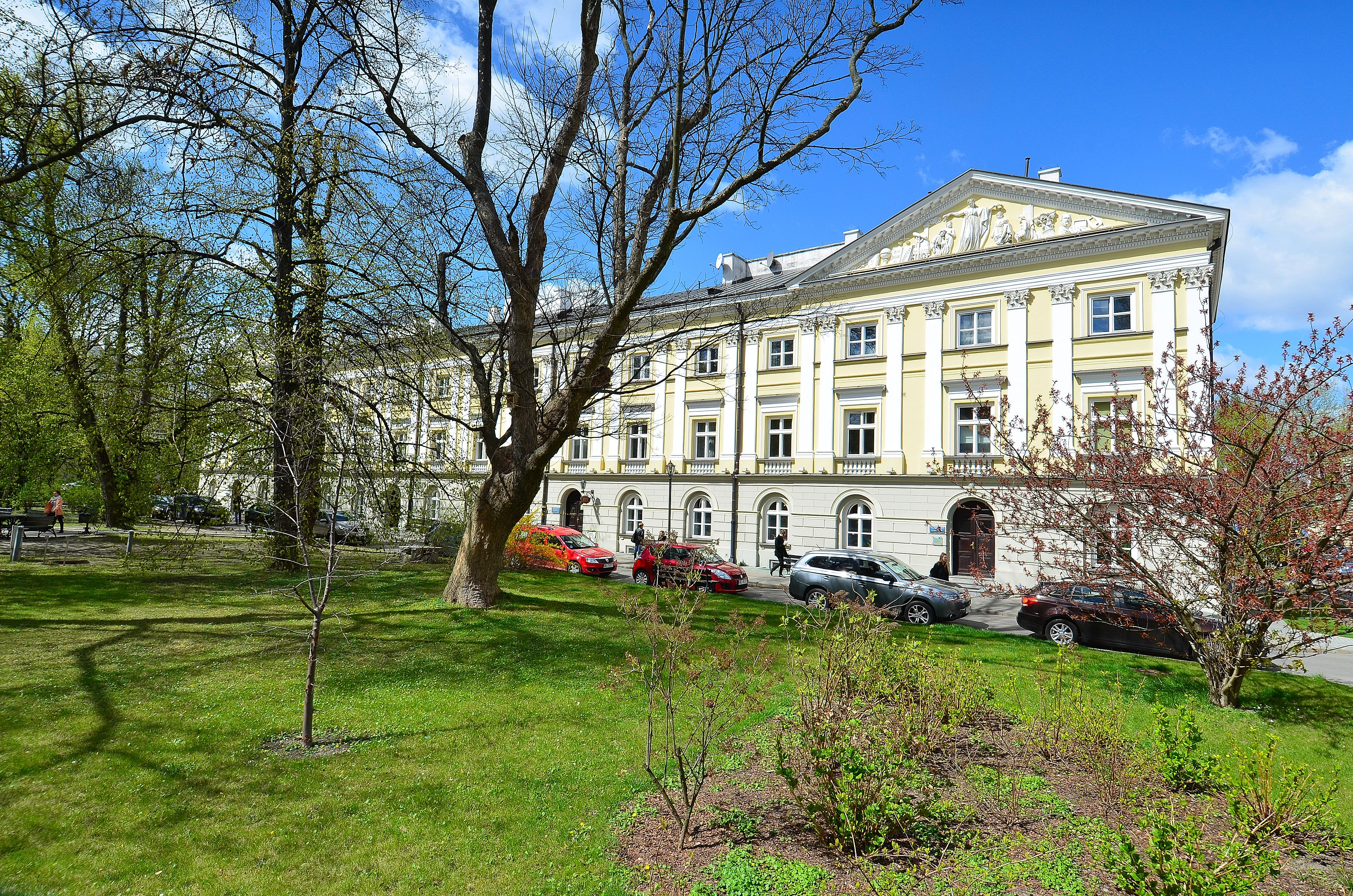 Budynek Porektorski Uniwersytetu Warszawskiego